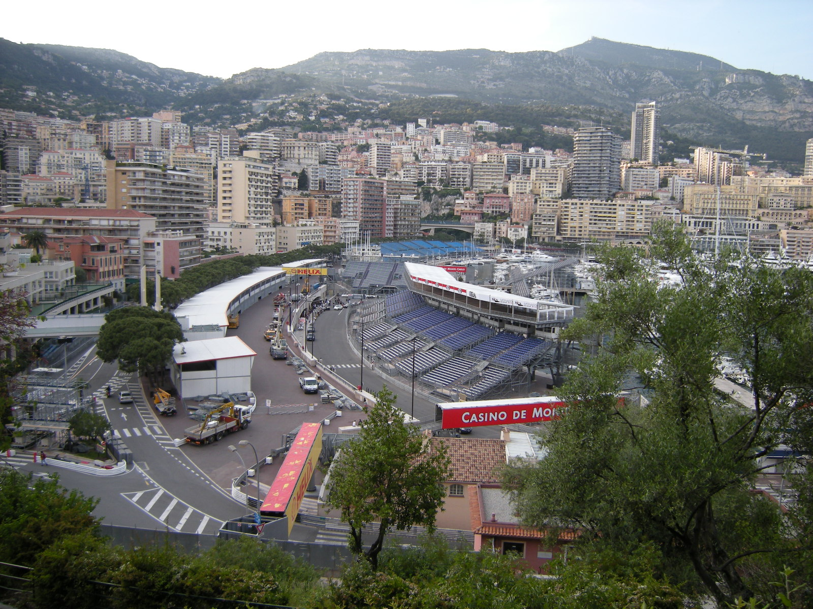 Área dos Boxes. À direita (atrás das árvores), curva Rascasse